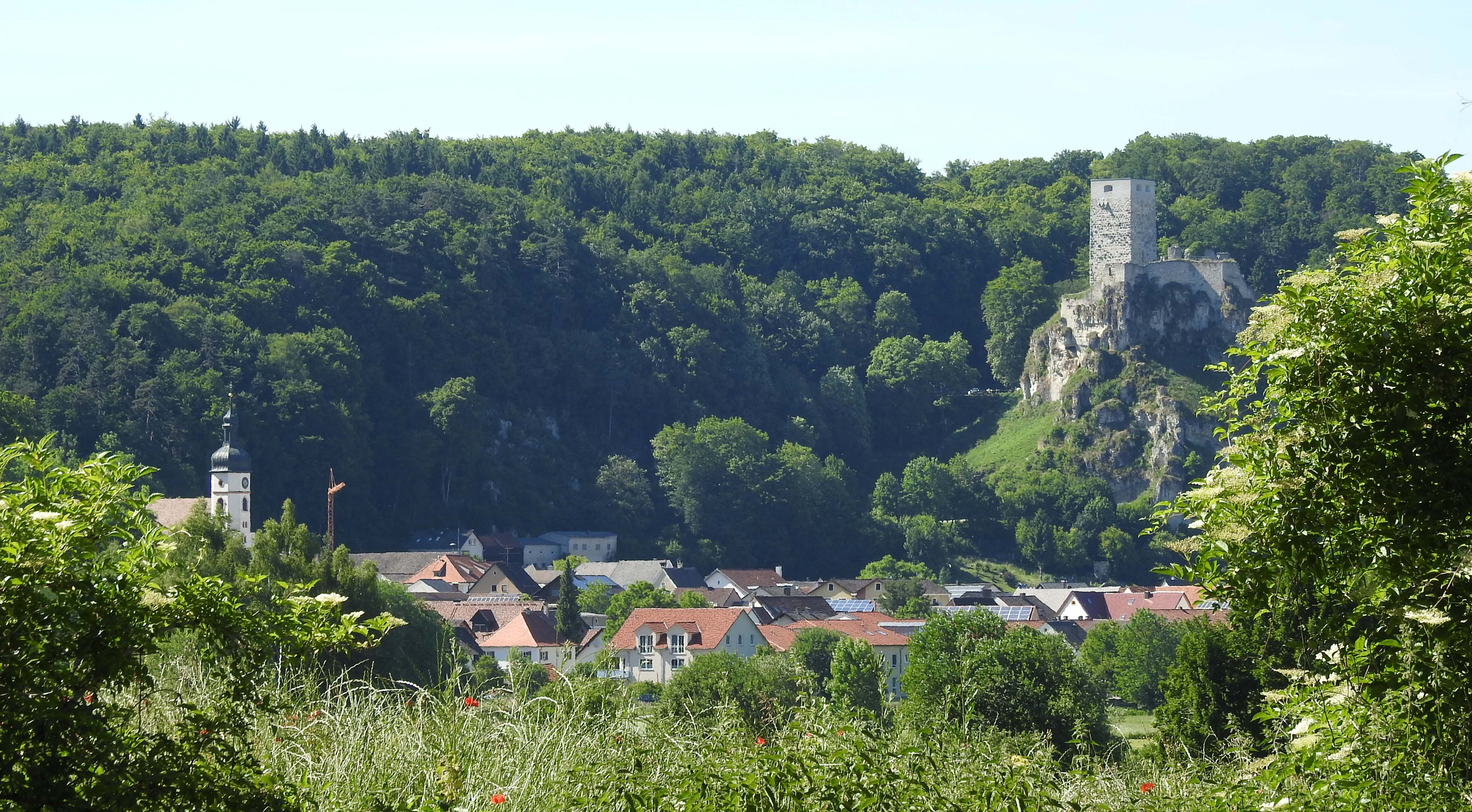 Weillheim von Südosten